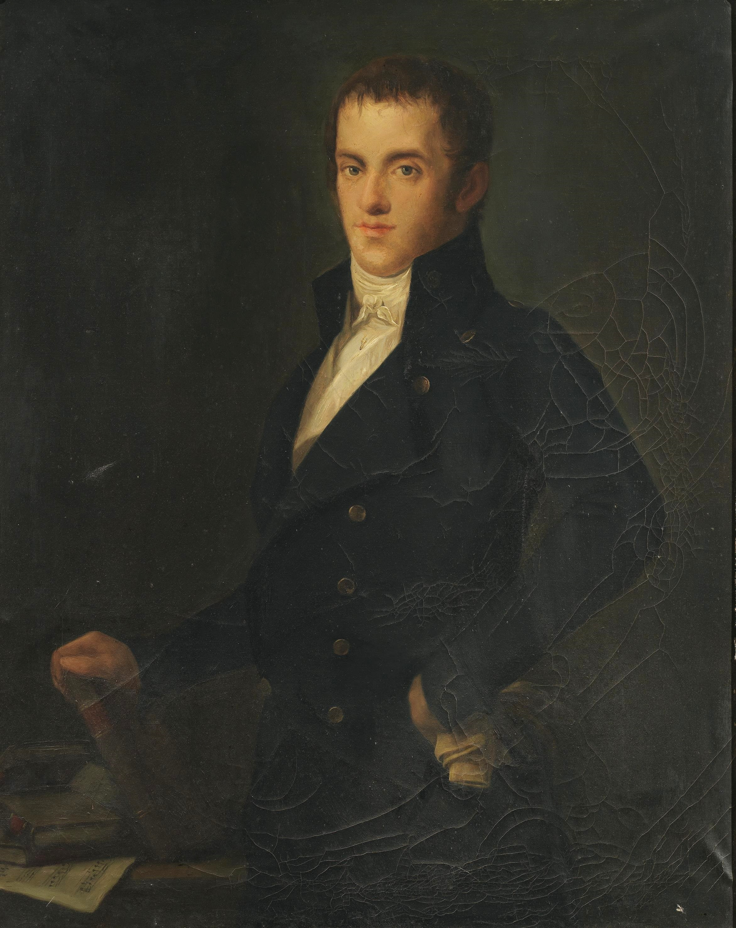 Retrato del caballero gaditano Gabriel de Aristizábal y Sequeira, que el día 26 de julio de 1805 ingresó como caballero en la Orden de Carlos III. Y contrajo matrimonio con la dama alemana Carolina de Rentt, que era natural de Dresde.